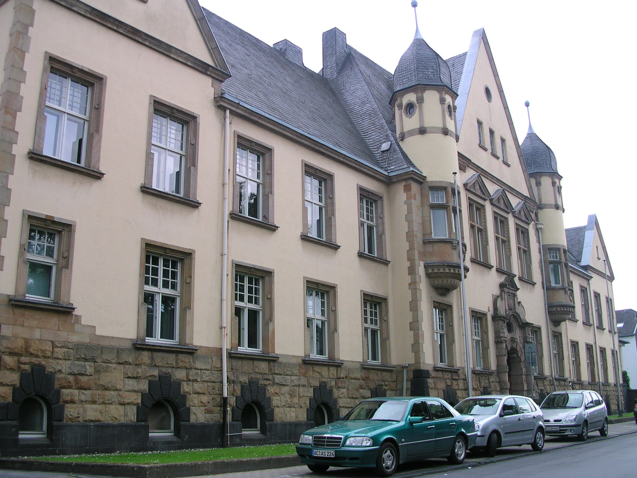 Eschweiler, Amtsgericht